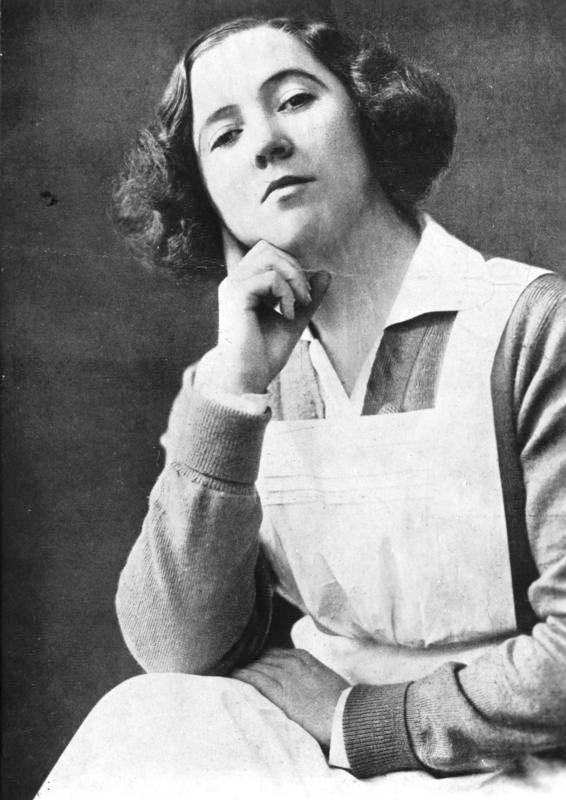 Claire Waldoff Zentralbild Berlin